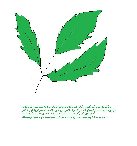 اگر سه تا برگ داره بهش دست نزن